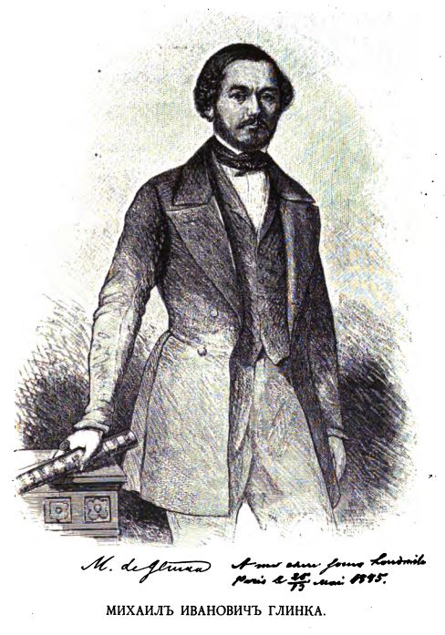 Глинка Михаил Иванович